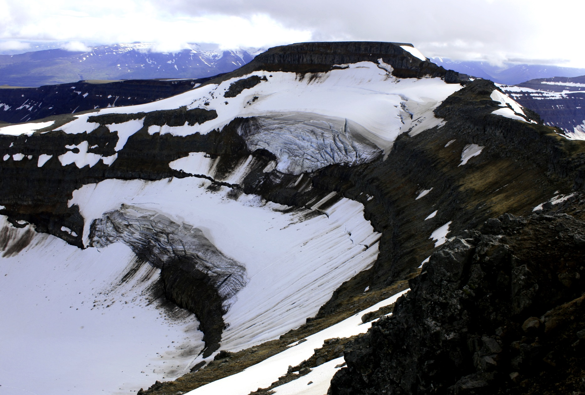 Dýjafjallshnjúkur